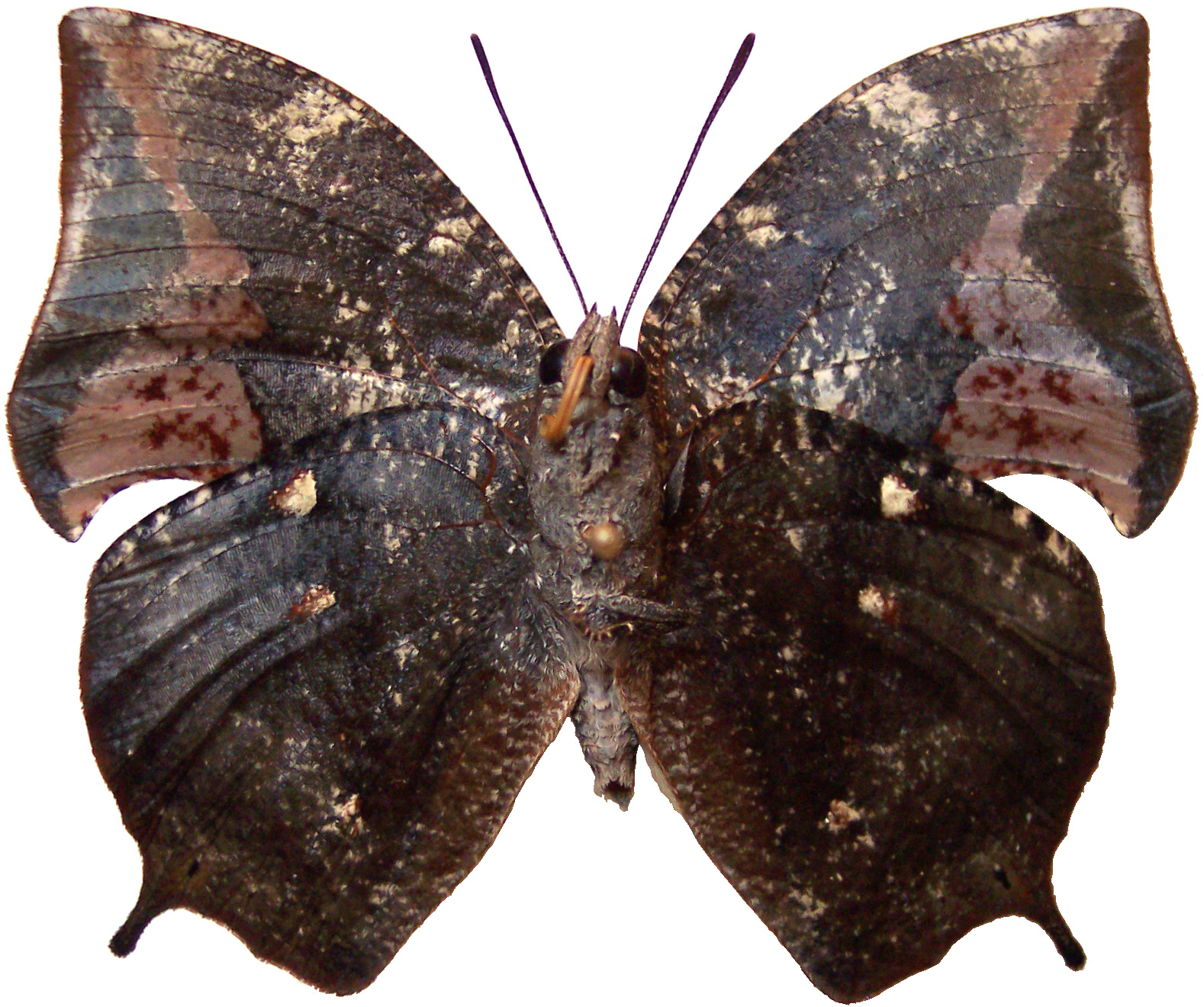 Memphis acidalia - Amazonas, Pérou